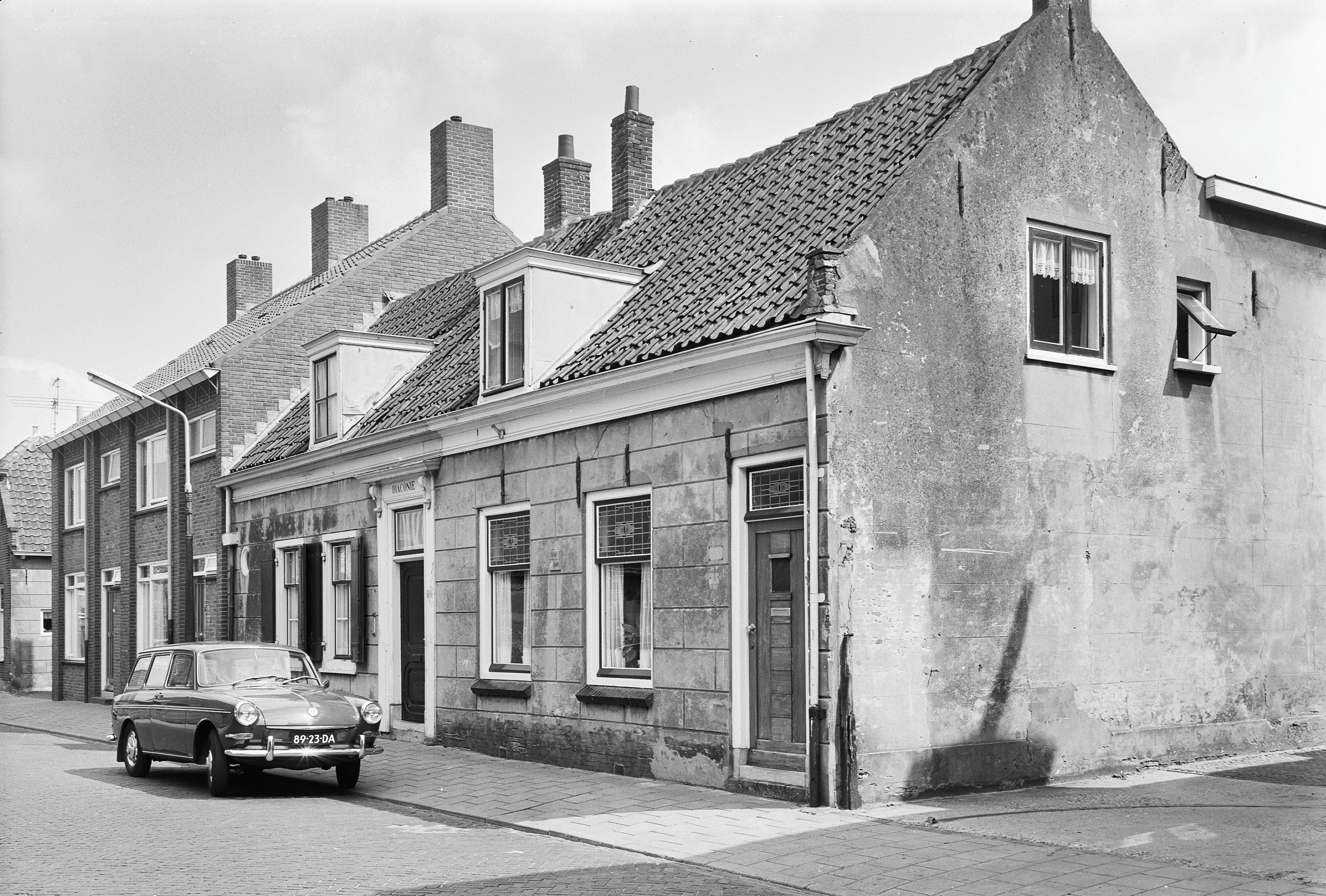 aanzicht